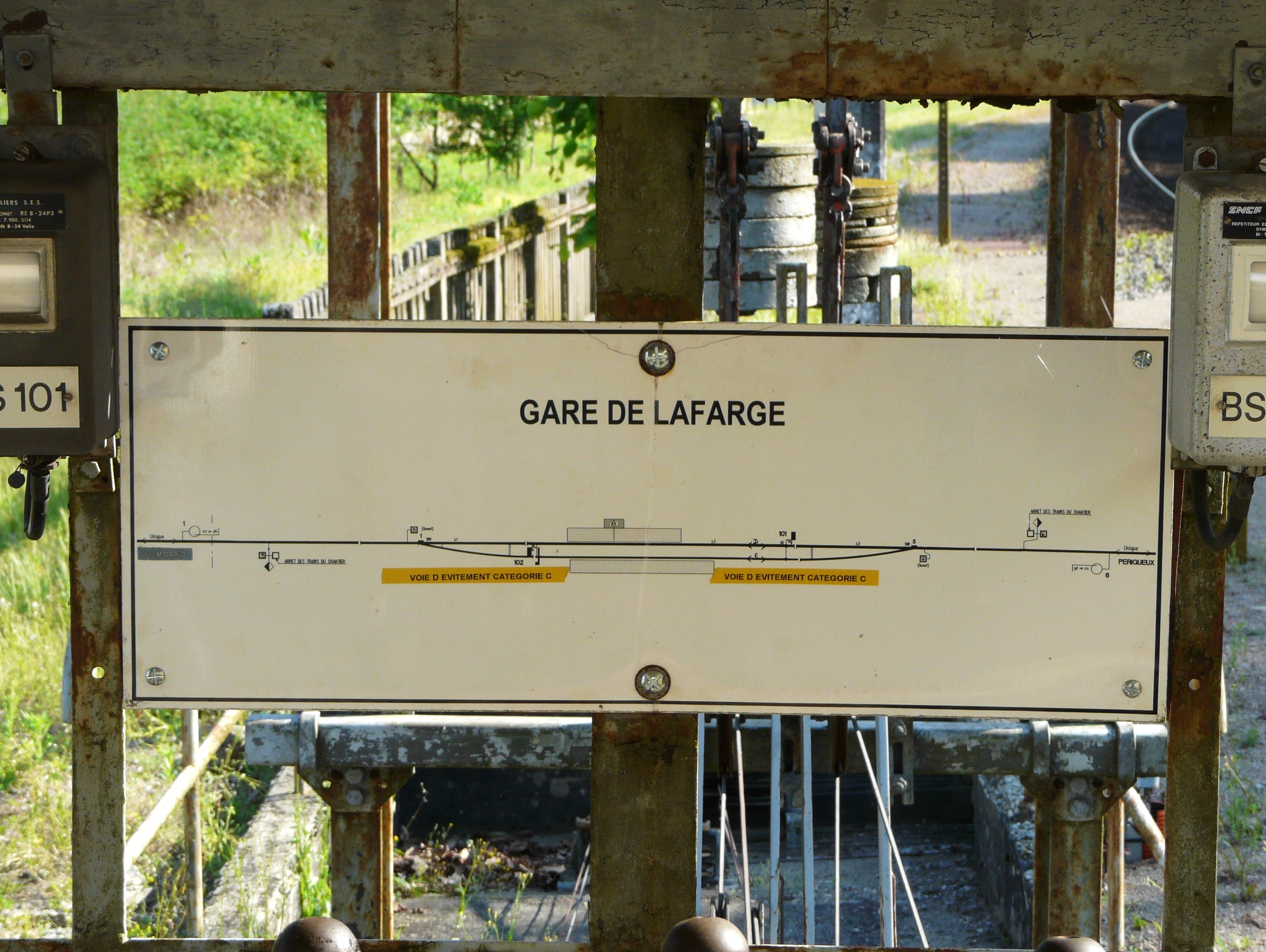 Le schéma des voies au poste d'aiguillage manuel, gare de Lafarge, Saint-Hilaire-les Places, Haute-Vienne, France.